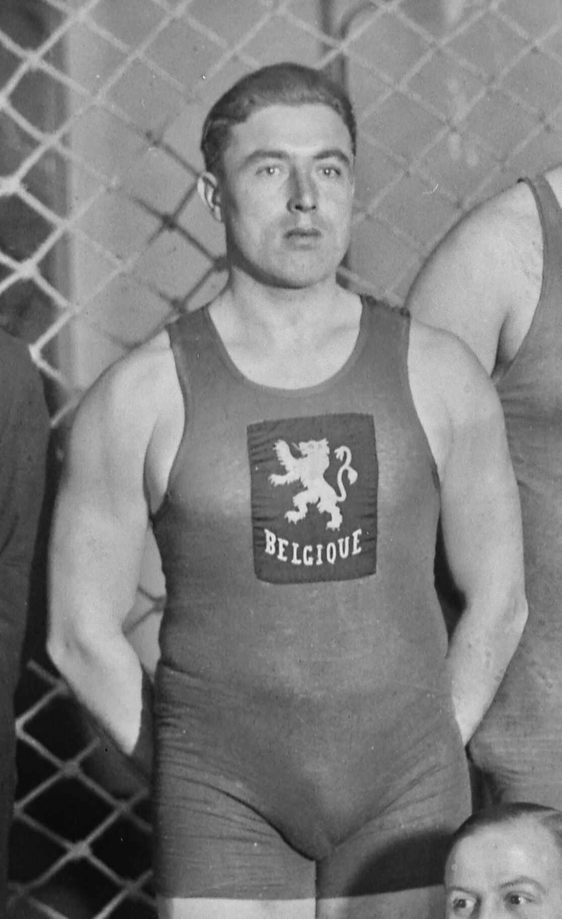 30-12-22, match France-Belgique, équipe de water-polo belge : Joseph Pletinckx : [photographie de presse] / [Agence Rol]